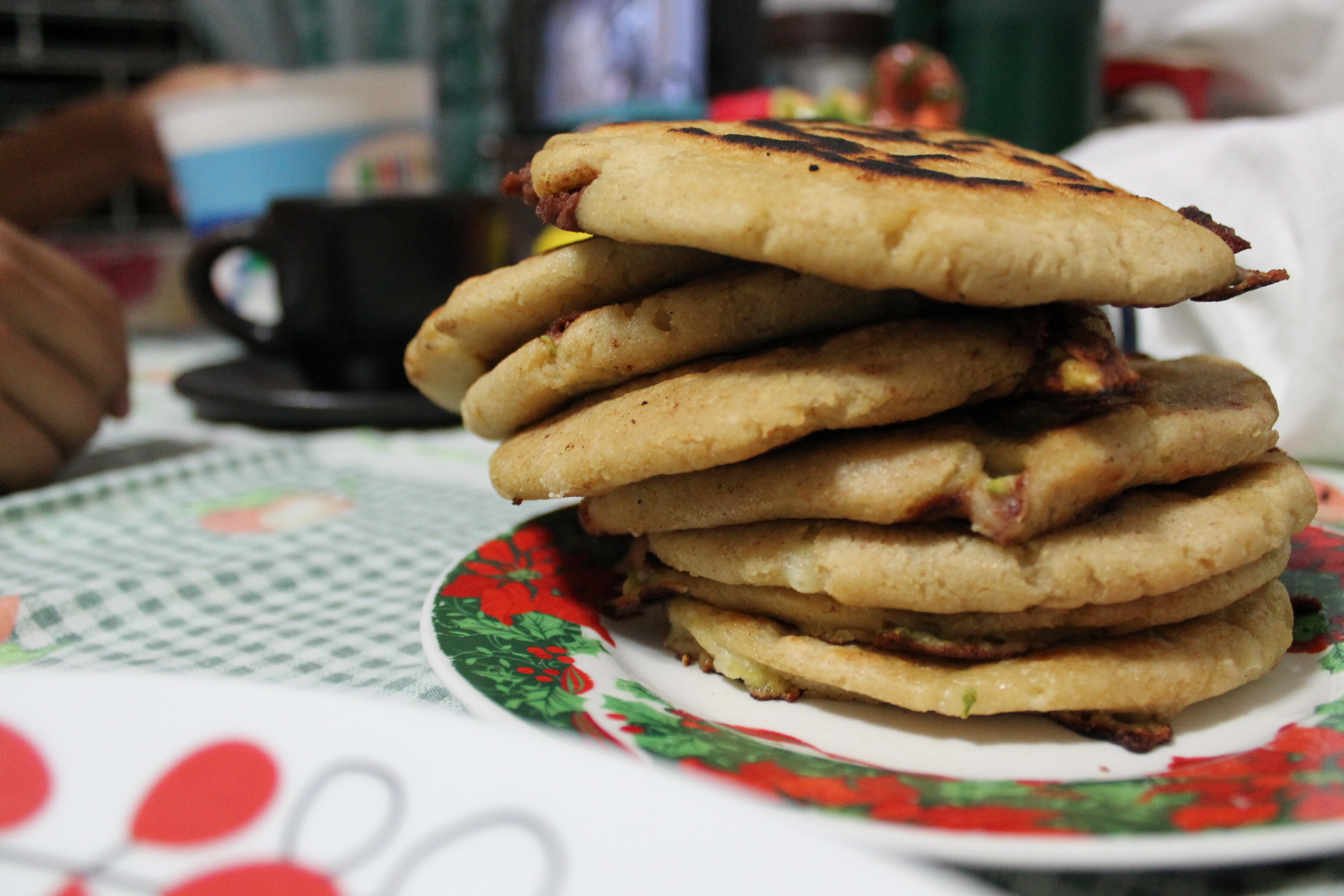 Pupusas Salvadoreñas